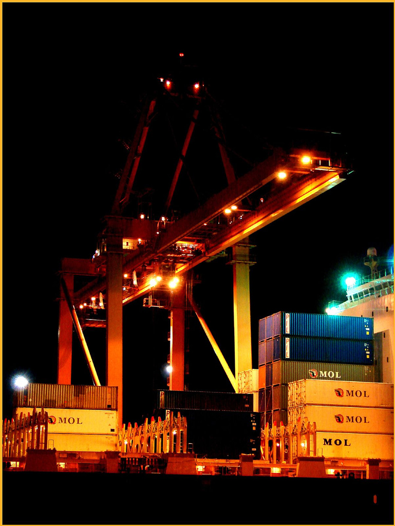 Recuerdo en mi niñez cuando fui al trabajo de mi papá en el puerto, me impacte al descubrir un mundo nuevo: grúas gigantes, gritos, el río y ahí yo, mirando como mi papá trabajaba. Fue algo divertido, cada vez que paso por el puerto, me viene aquel recuerdo, en el cual todo era muy gigante y yo era tan pequeña.